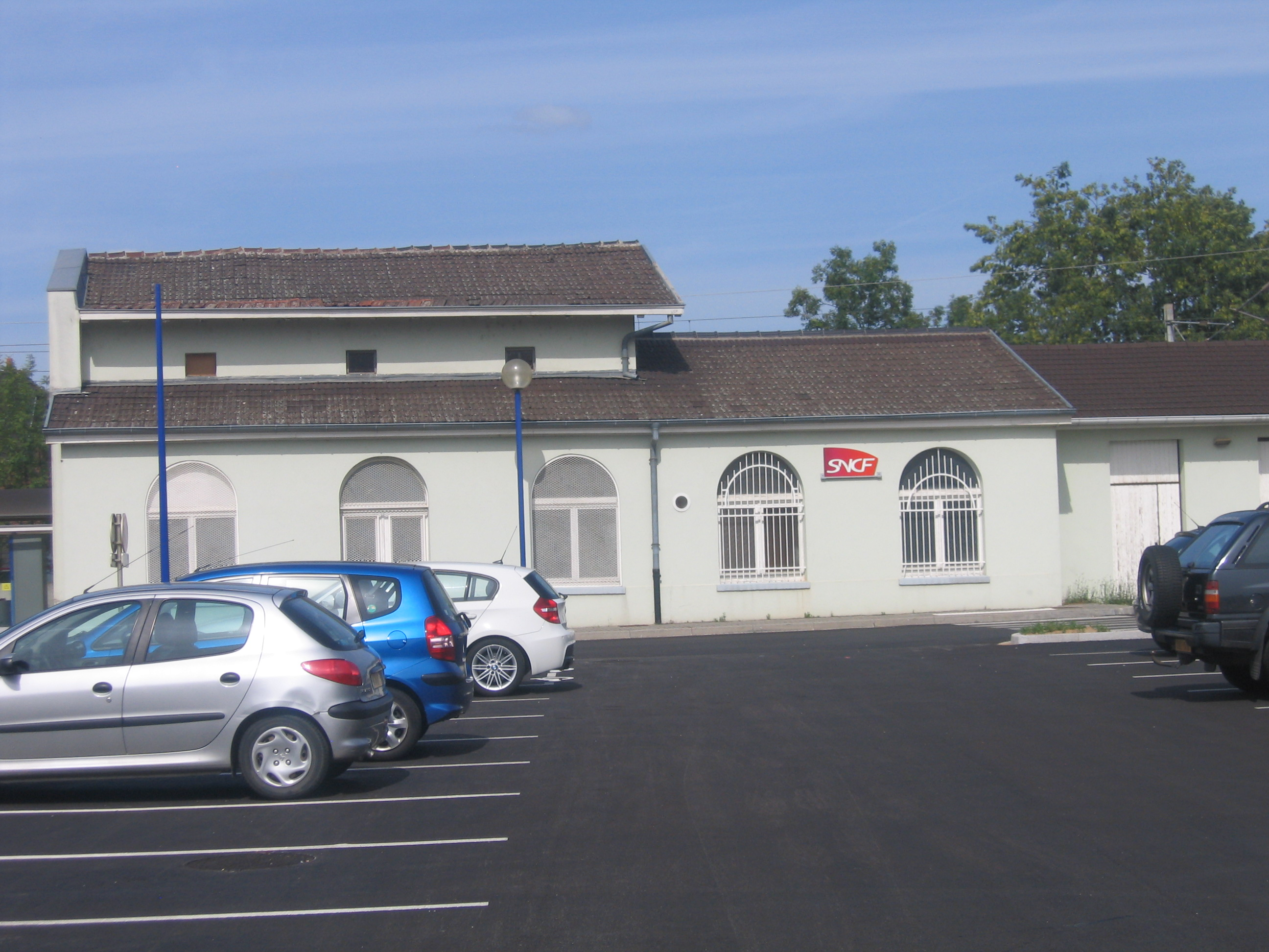 La gare de Sierentz vue depuis l'entrée de son tout nouveau "parc de stationnement".